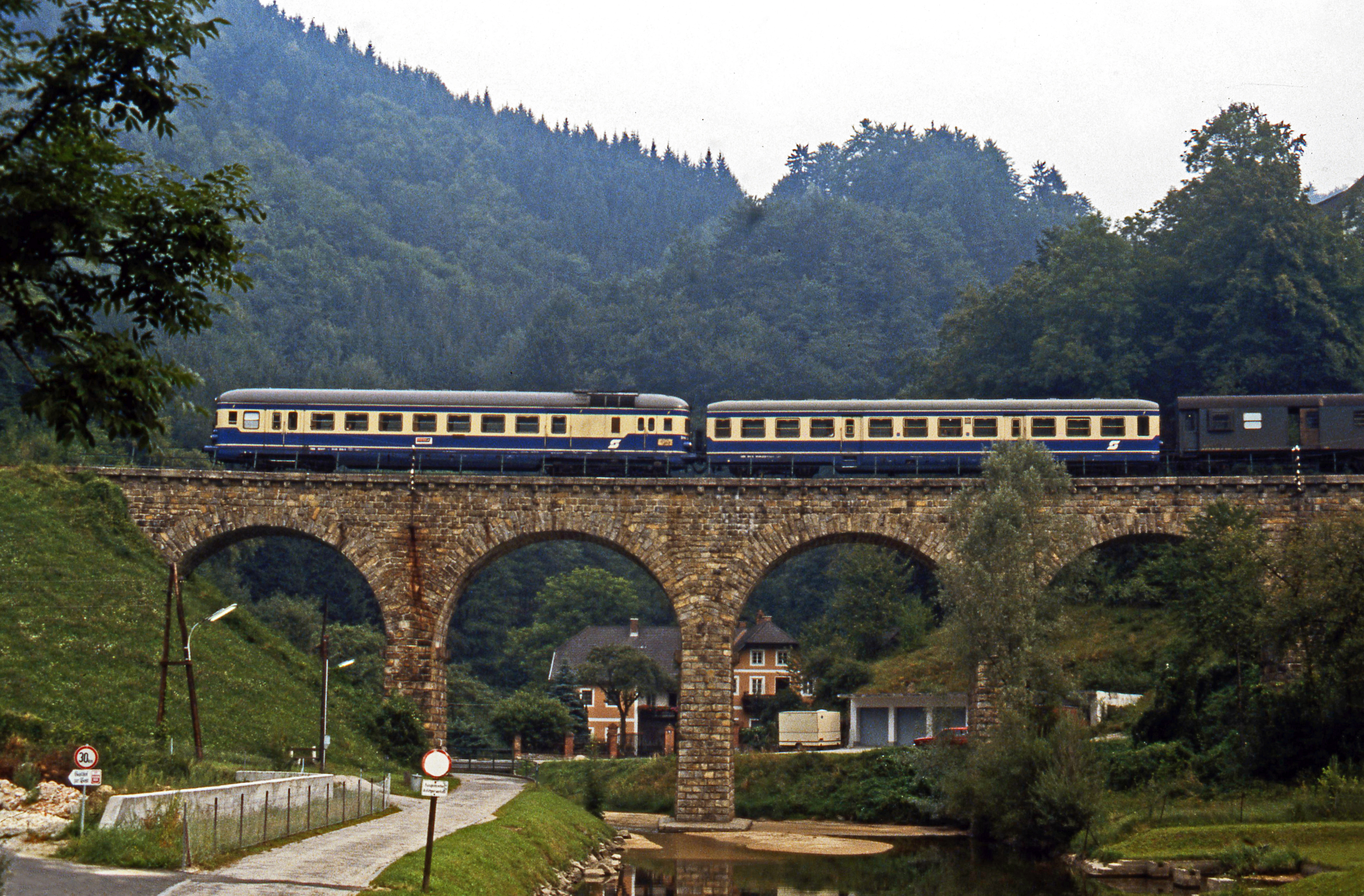 Ein Triebzug mit ÖBB 5146 auf dem Viadukt über den Dimbach in St. Nikola an der Donau.